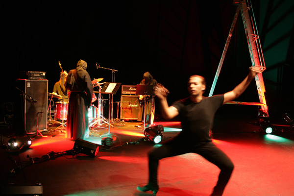 Espectáculo "El final de este estado de las cosas"